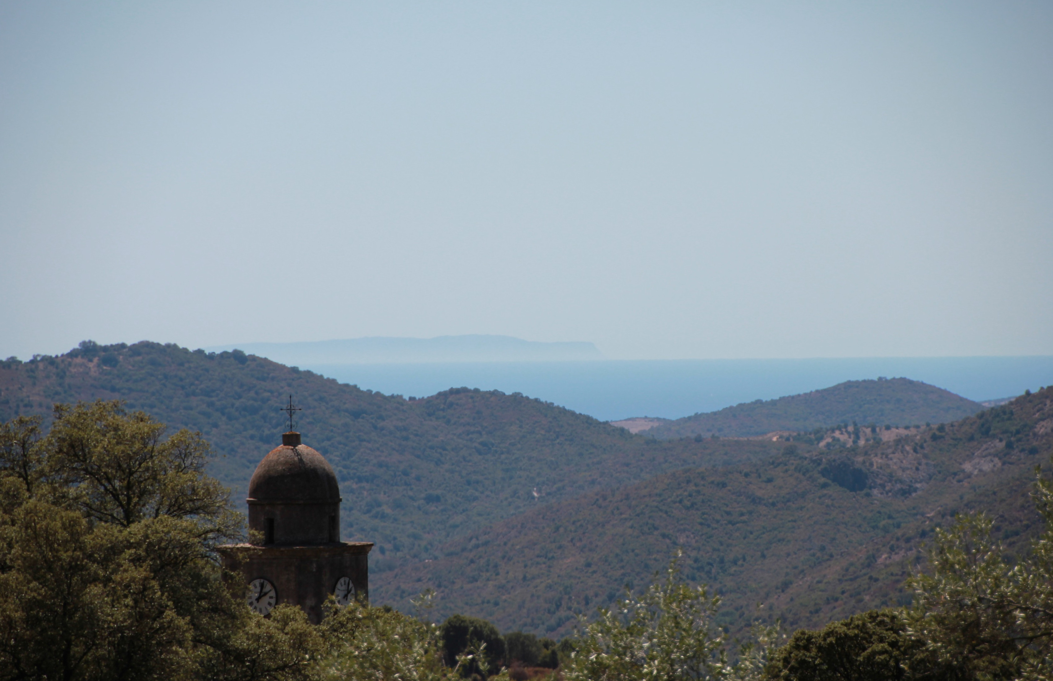 Île d'Asinara (Sardaigne, Italie), vue de Cognocoli-Monticchi (Corse-du-Sud, France)